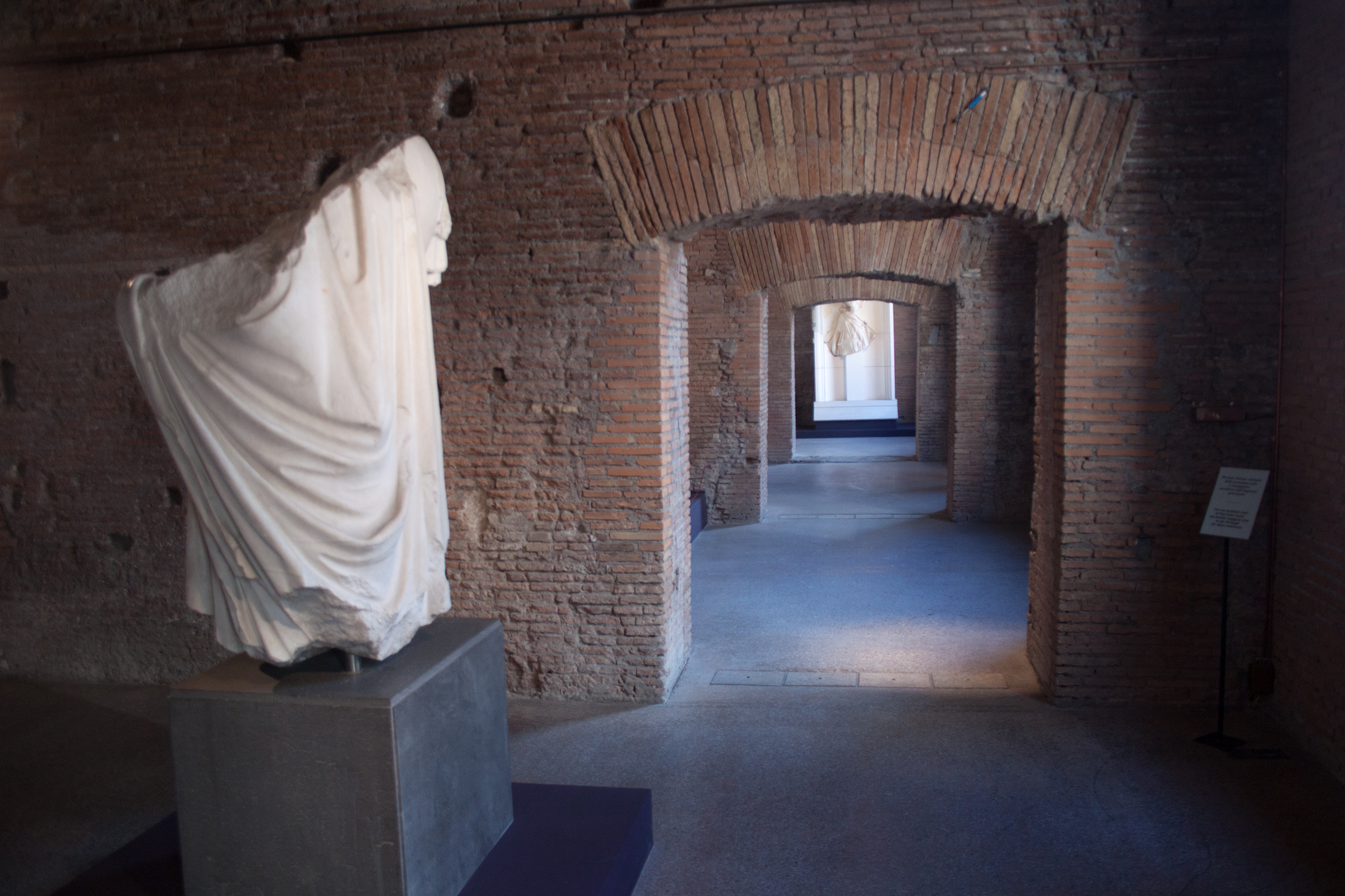 Mercato di Traiano